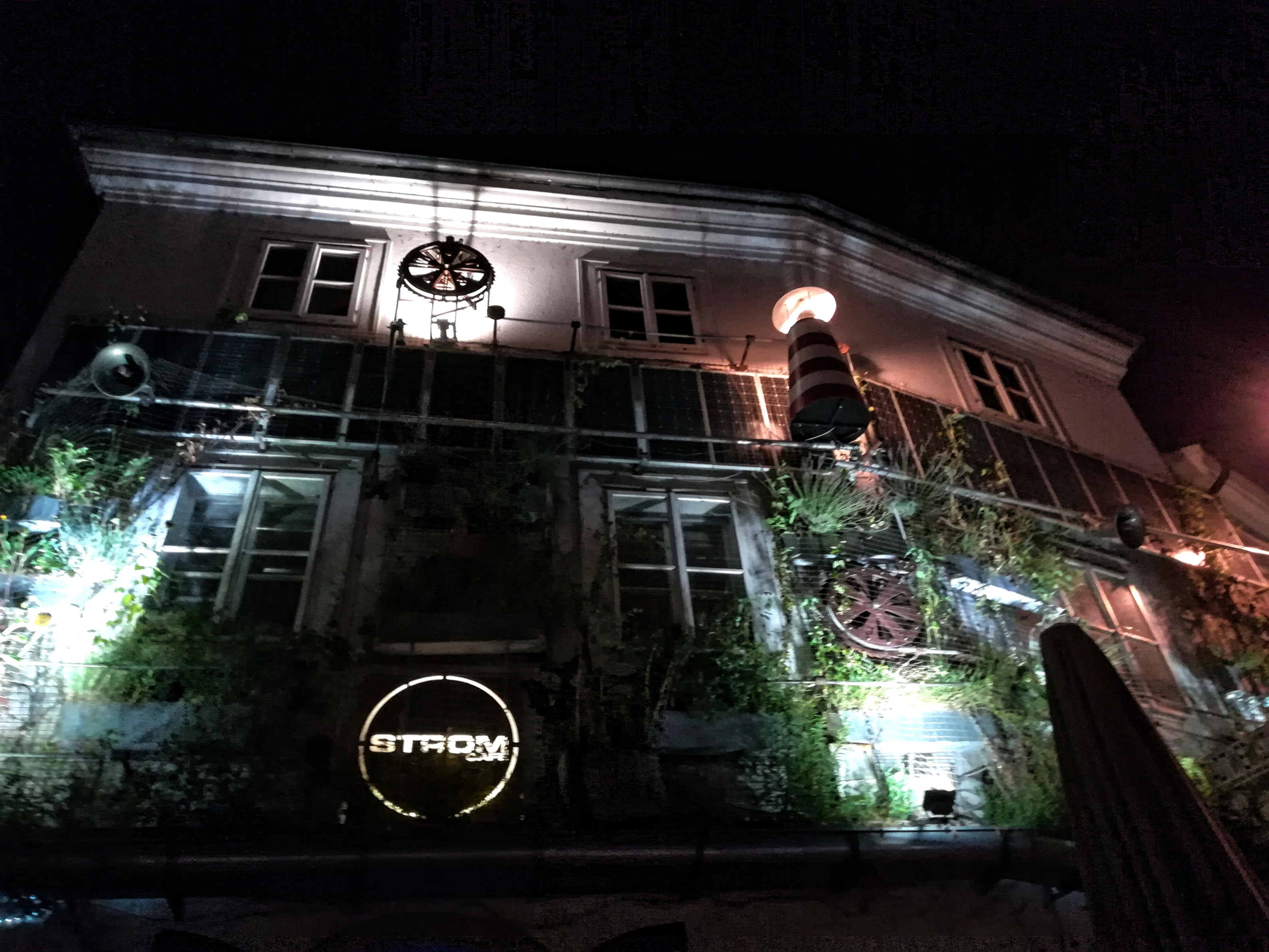 Stadtwerkstatt und Cafe Strom, Linz